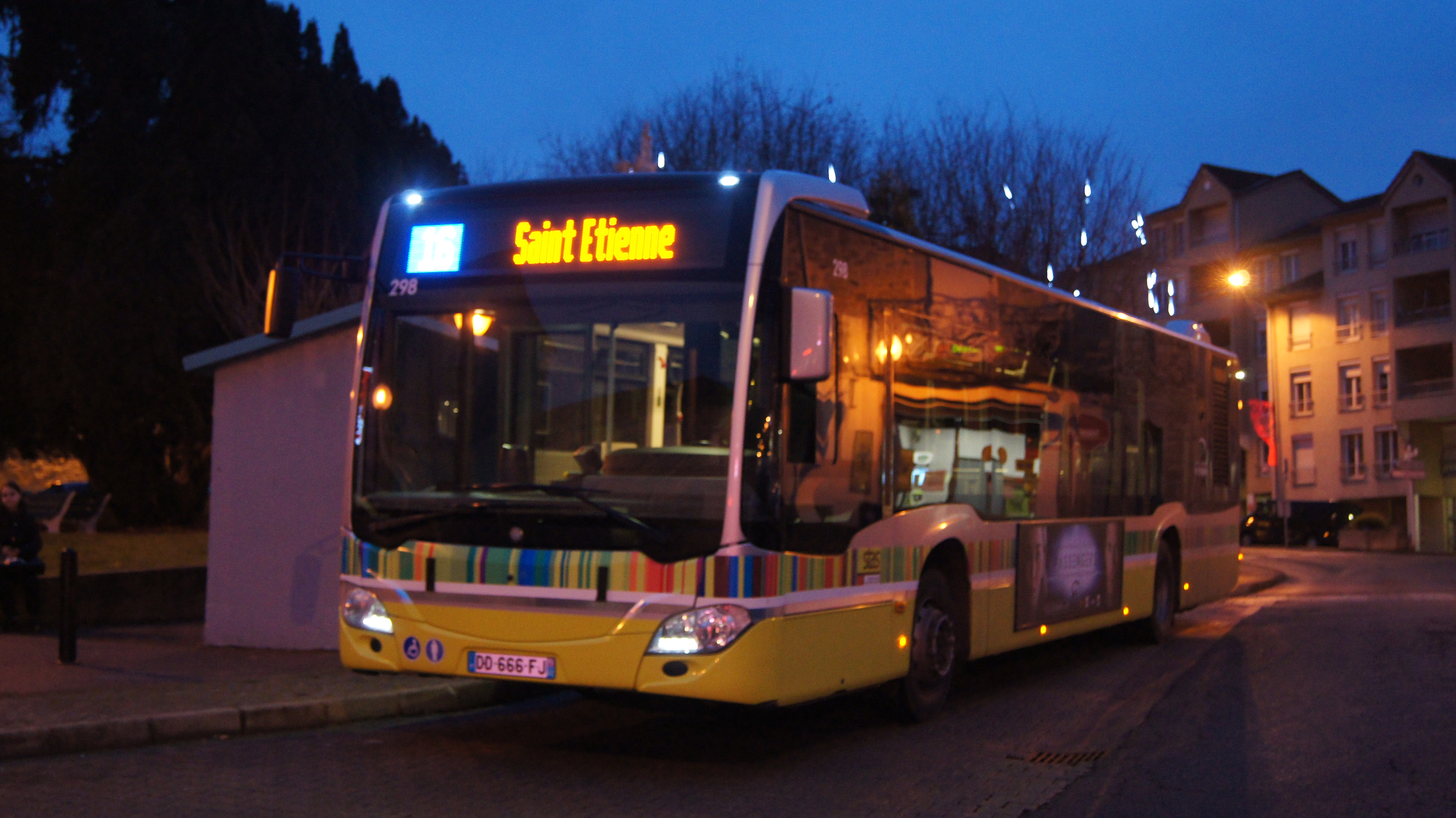 ligne 16 Mercedes Citaro C2 Euro 5 à PLACE GAMBETTA VILLARS